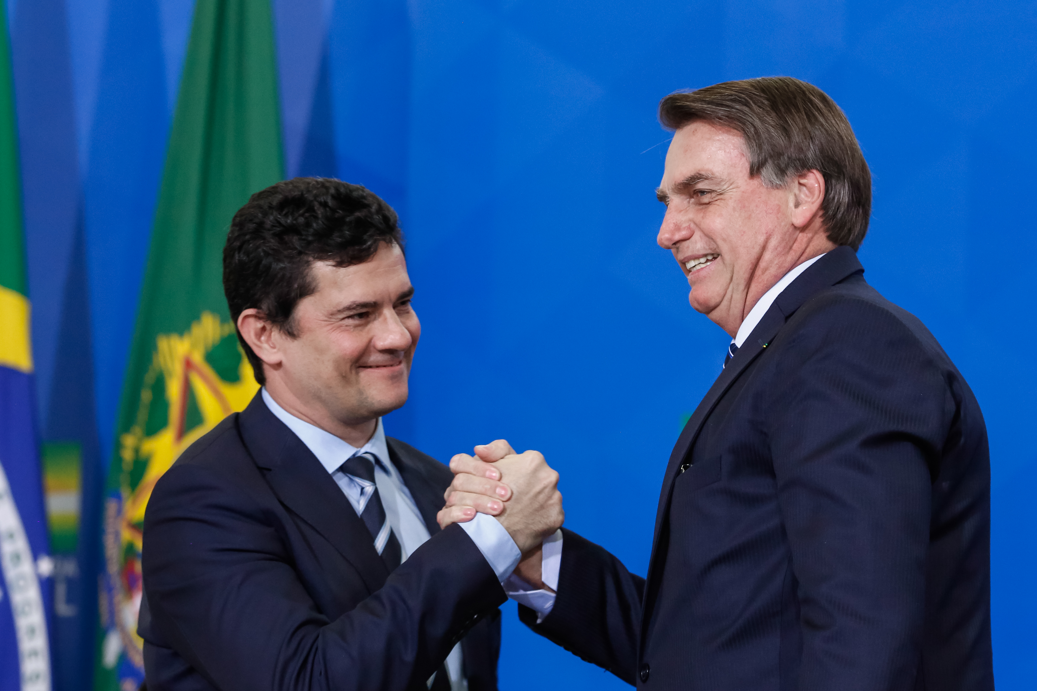 (Brasília - DF, 29/08/2019) Solenidade de Lançamento do Projeto em Frente Brasil. Foto: Carolina Antunes/PR